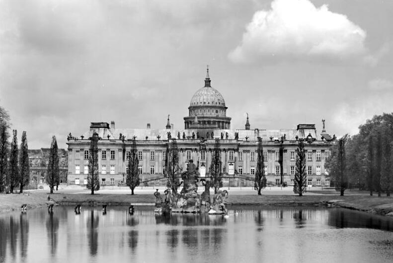 Potsdam.- Stadtschloß